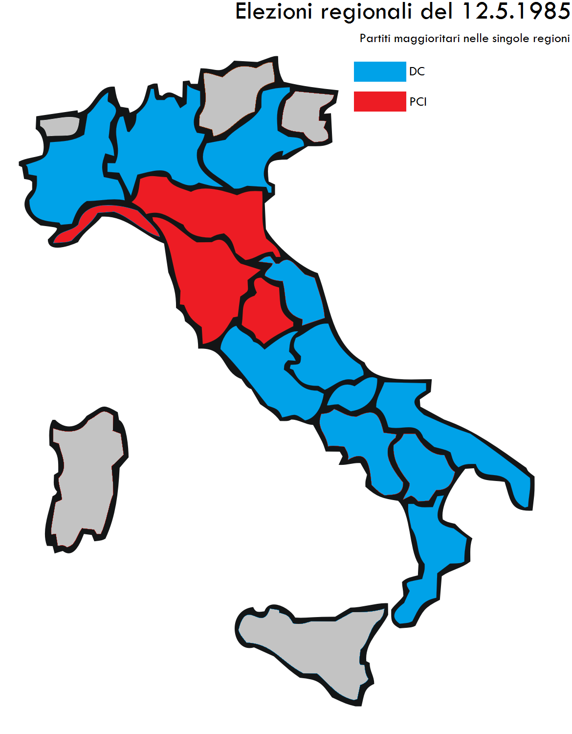 Elezioni regionali italiane del 1985, distribuzione del voto